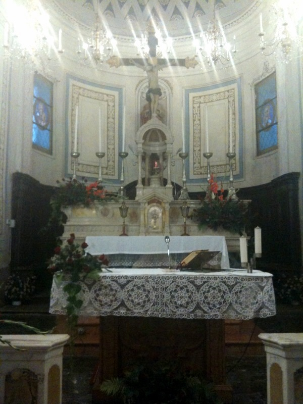 Chiesa di San Matteo, Giusvalla (SV) Italy